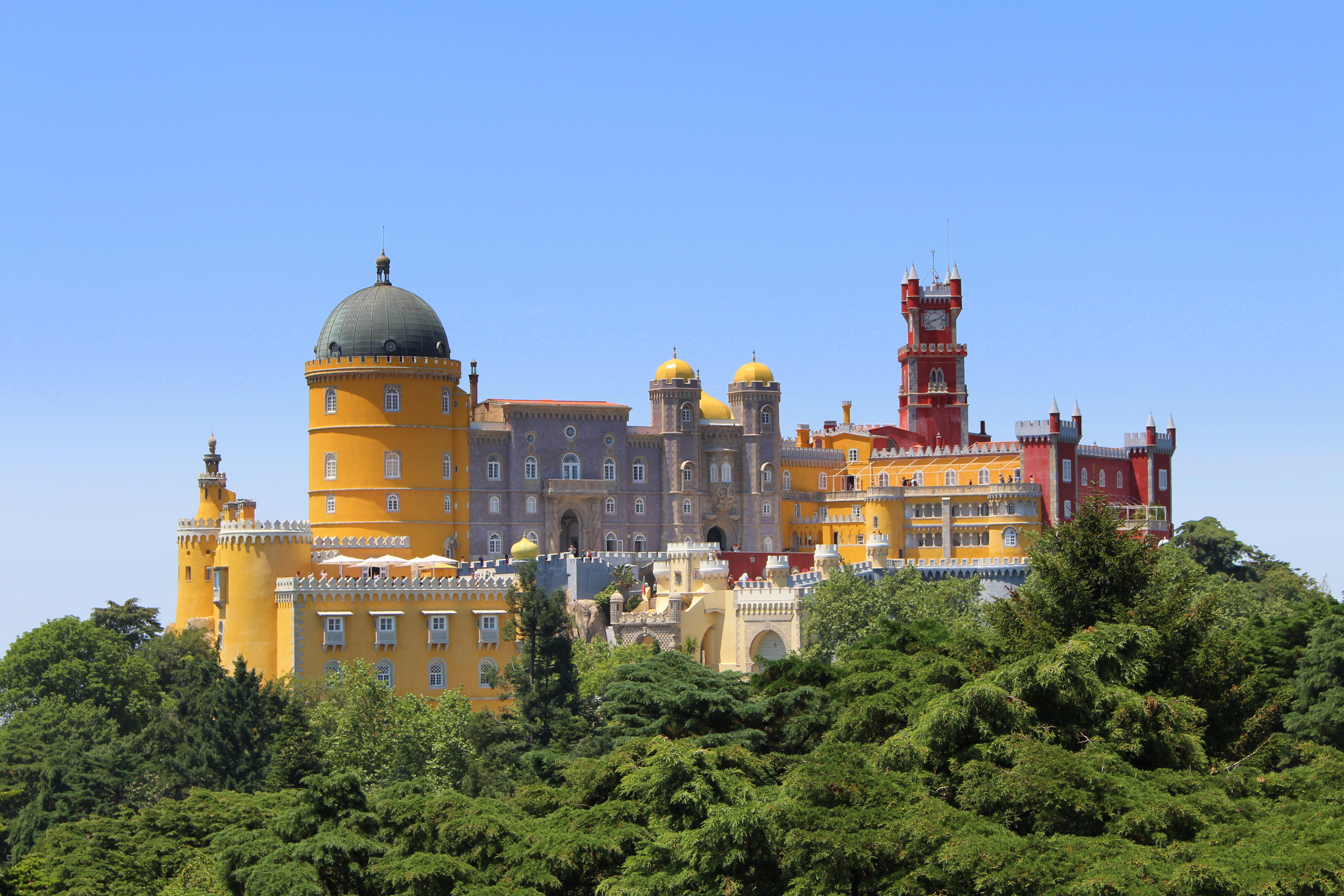 Sintra - Palacio da Pena